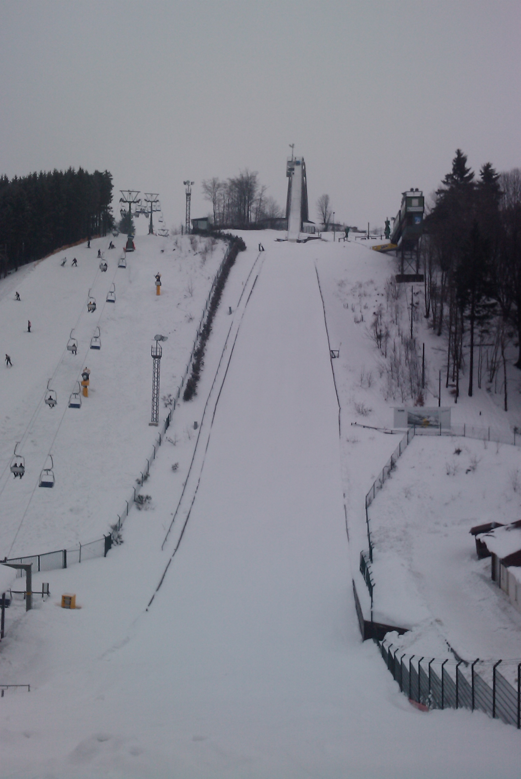 St.-Georg-Schanze in Winterberg, Germany. Original description: one-day Winterberg